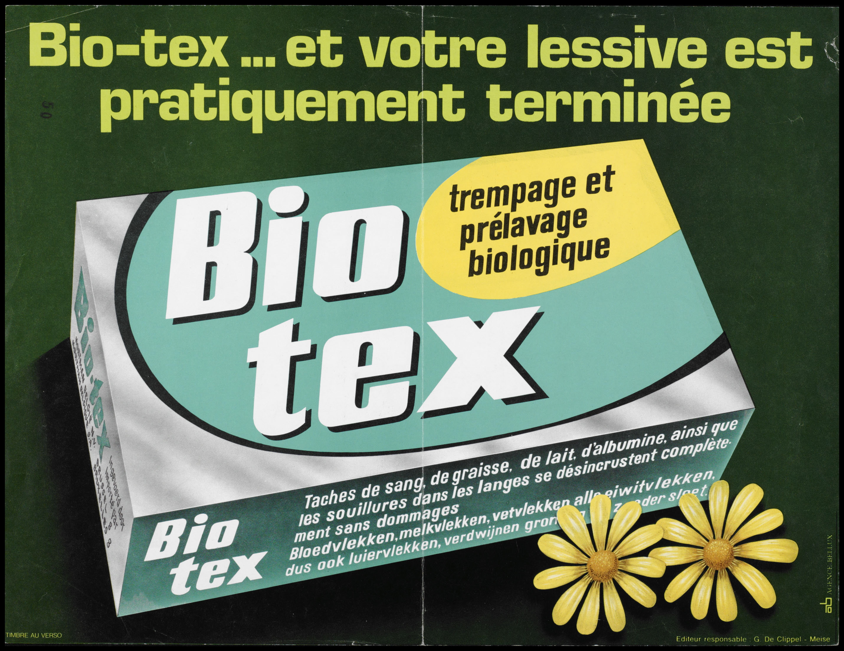 Affiche Dobbelman Beschrijving "Bio-tex... et votre lessive est pratiquement terminée Biotex trempage et prélavage biologique Editeur responsable: G. De Clippel - Meise Agence Bellux"